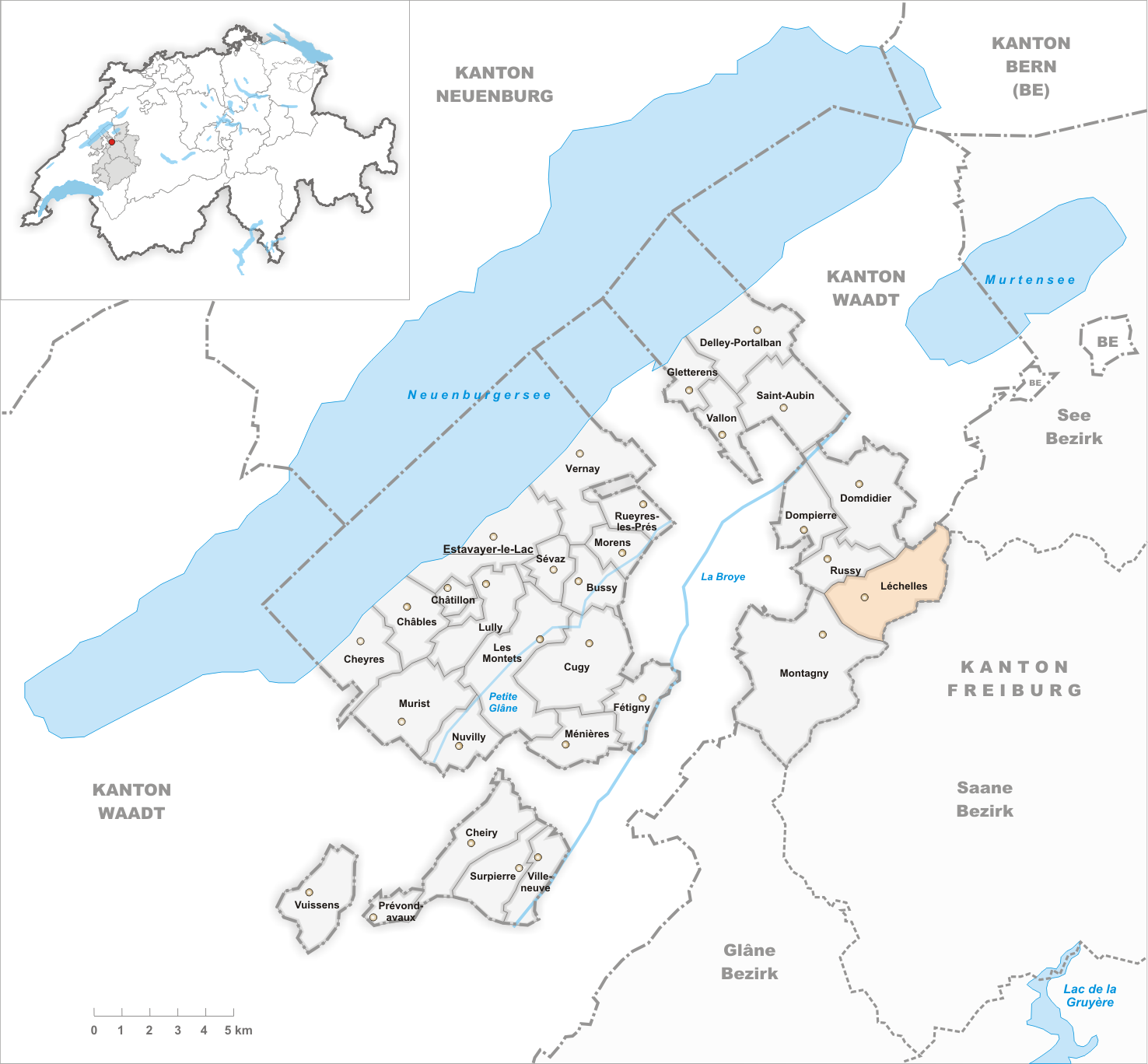 Municipality Léchelles